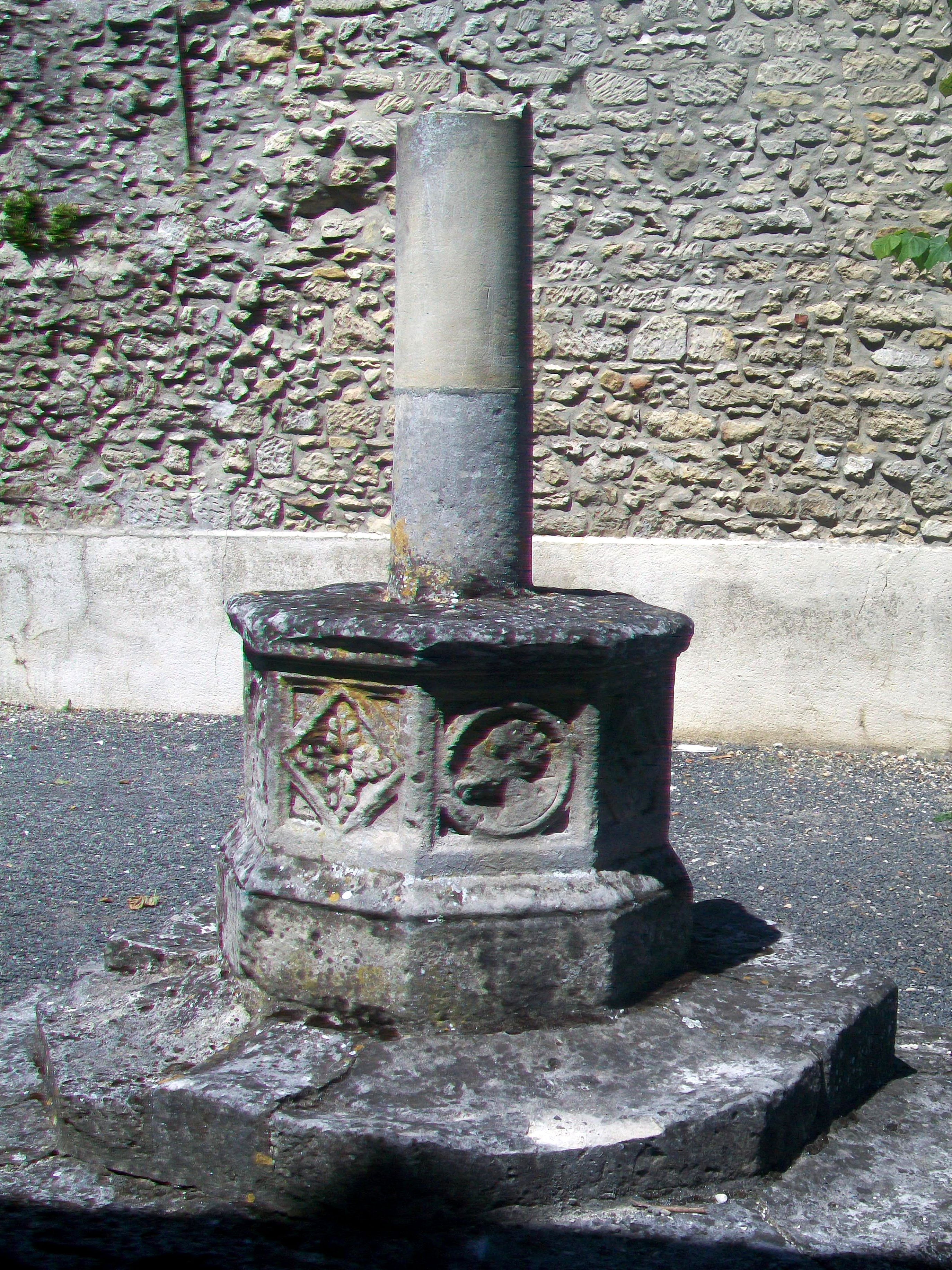 Vue de détail des éléments sculptés sur le socle du calvaire.